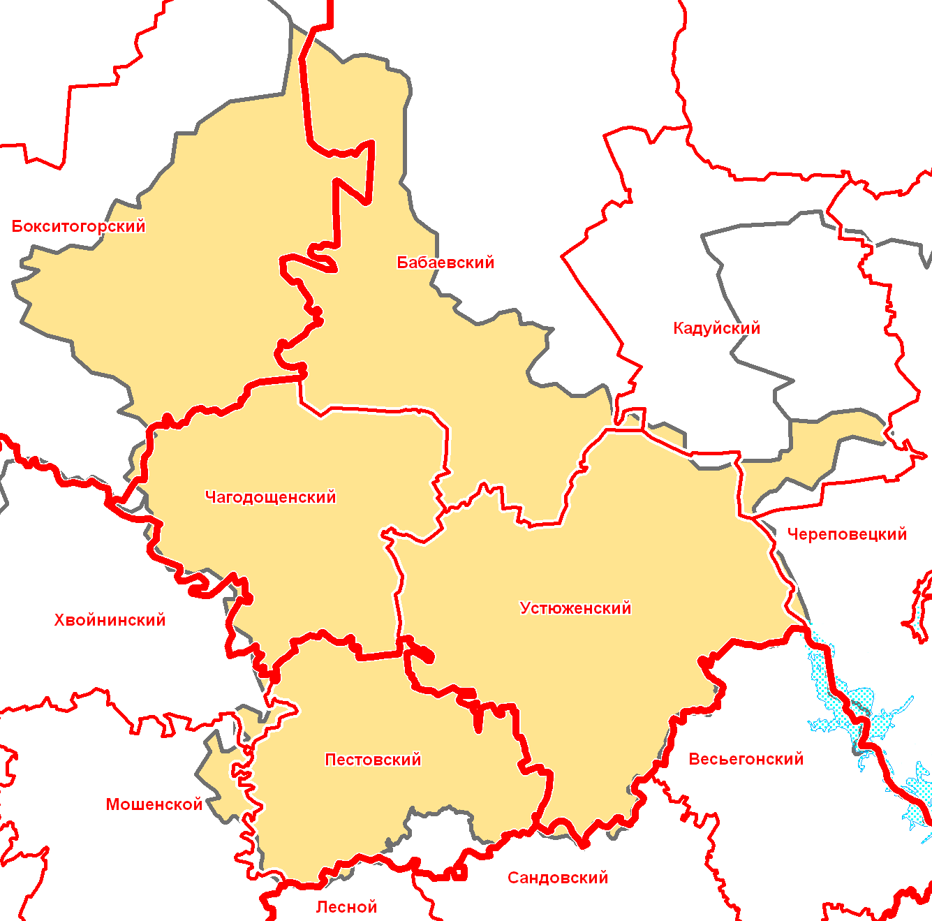 Устюжинский уезд Новгородской губернии в современной сетке районов